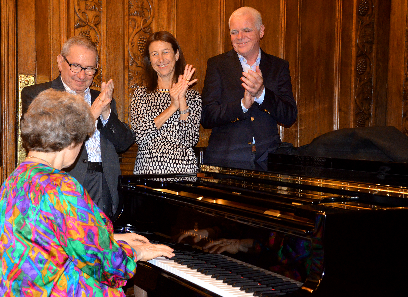 Ausklang der Feierlichkeiten in der Villa Seligmann in Hannover zu Ehren des Musikwissenschaftlers, Dirigenten und Ehrenpräsidenten der Siegmund-Seligmann-Stiftung Andor Izsák, der an diesem Abend mit zahlreichen Gästen aus Politik, Wirtschaft und Kultur seinen 72. Geburtstag feierte. Zu später Stunde spielte die Pianistin Erika Lux in intimer Runde am Konzertflügel eine Auswahl der von ihr geliebten "bunten Musik" mit Werken etwa von Maurice Ravel und Claude Debussy, mit Applaus bedacht von ihrem Ehemann und Jubilar Andor Izsák sowie dem Ehepaar Marion und Claudio Esteban Seleguan, dem Vorstandsvorsitzenden der Pelikan AG und Urenkel des ehemaligen Direktors der Continental AG, Sigmund Seligmann ...